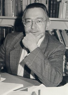 Cette photo de Roger Vigneron dans son bureau à l'université de Liège m'appartient et les enfants de Roger Vigneron (Lara et Georges Vigneron) m'ont autorisé expressément à la publier sur Wikipedia